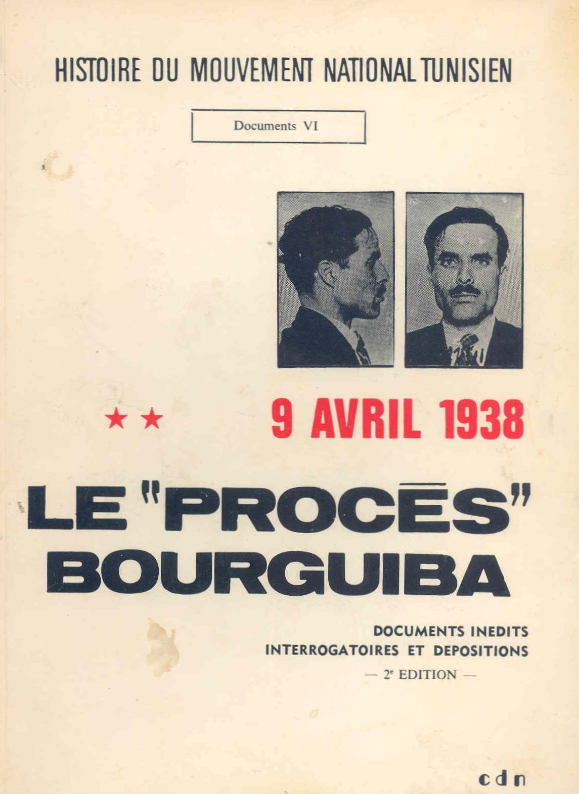 Couverture du livre "Le procès Bourguiba" publié en 1970 par le Centre de documentation nationale tunisien